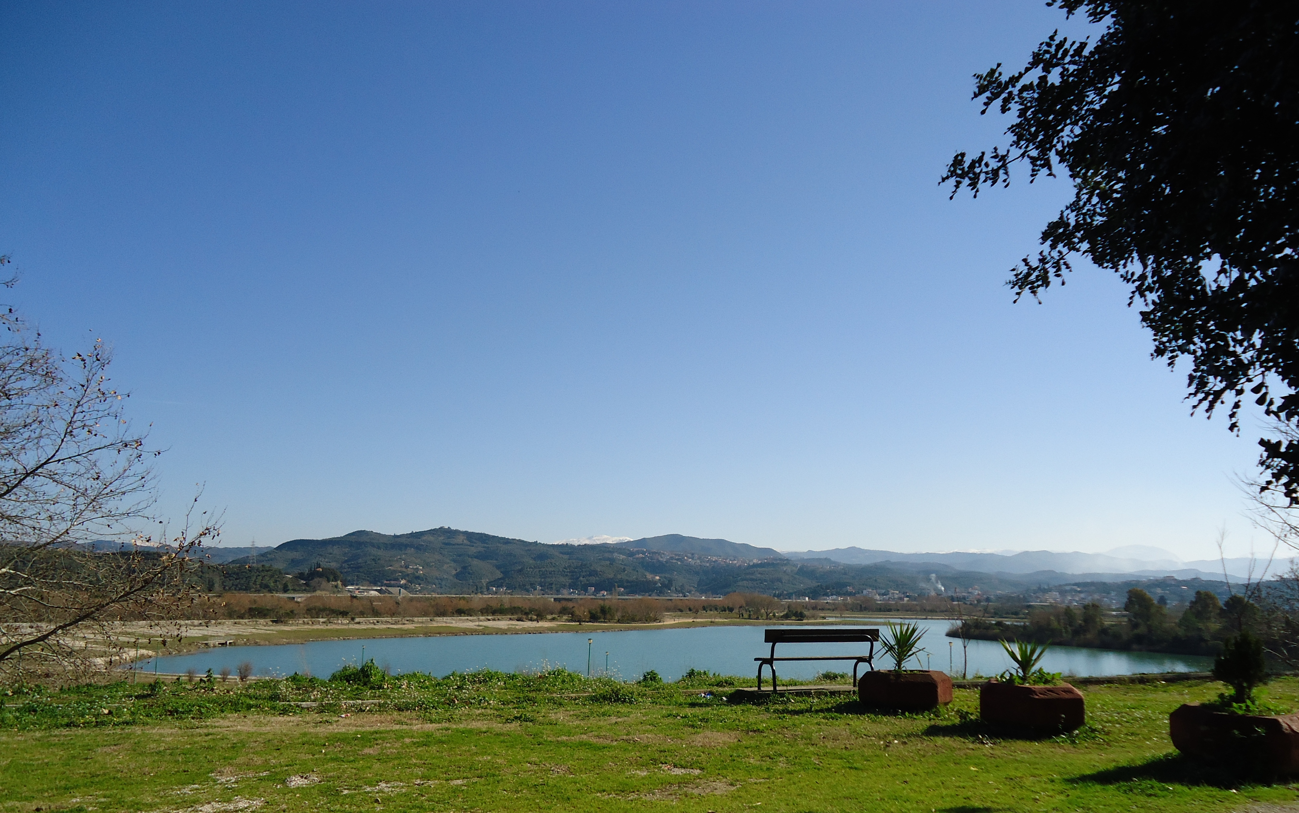 Τεχνητή λίμνη Άρτας.